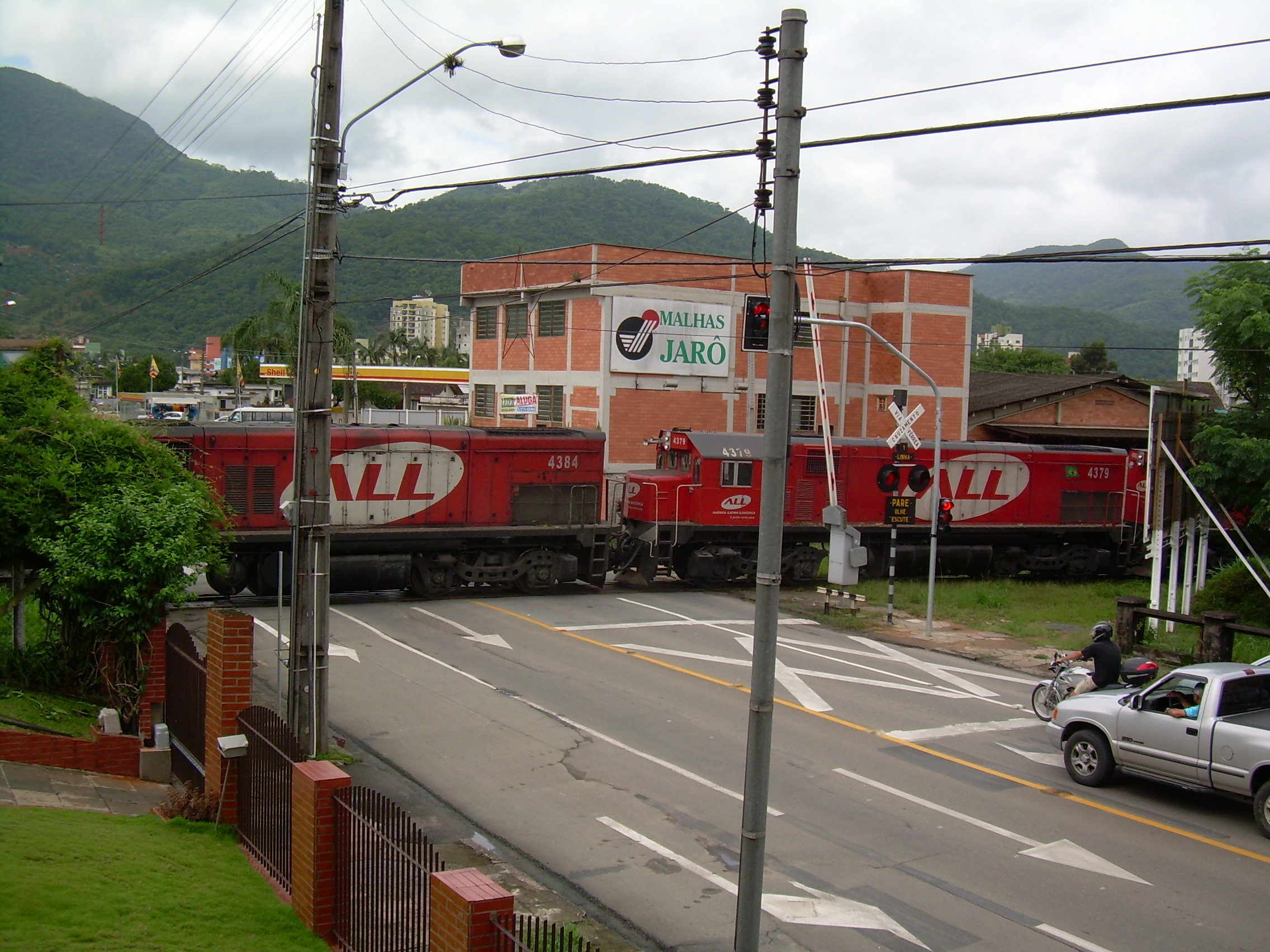 Jaraguá do sul, Brasil.